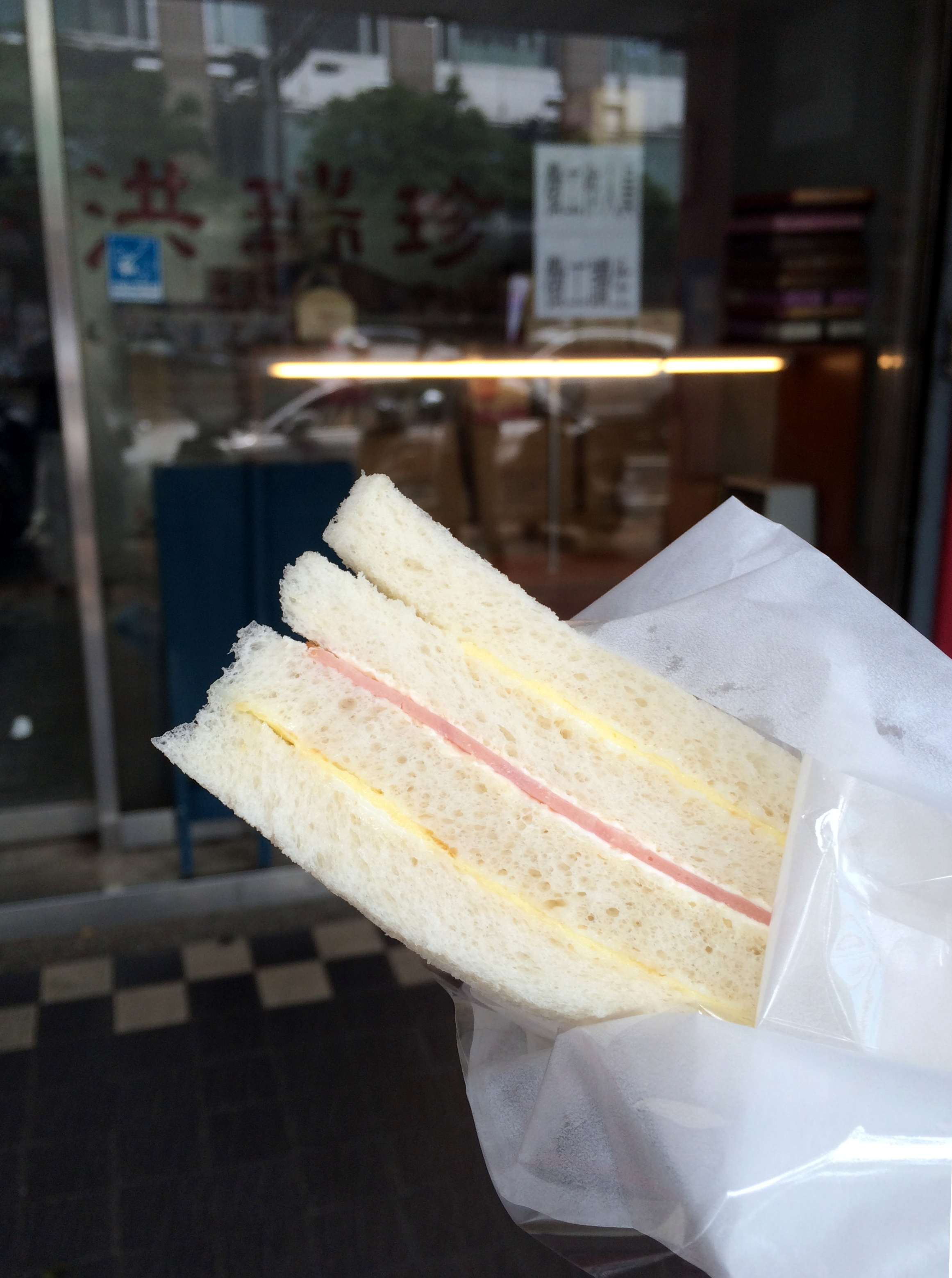 Horng Ryen Jen Ham Sandwich